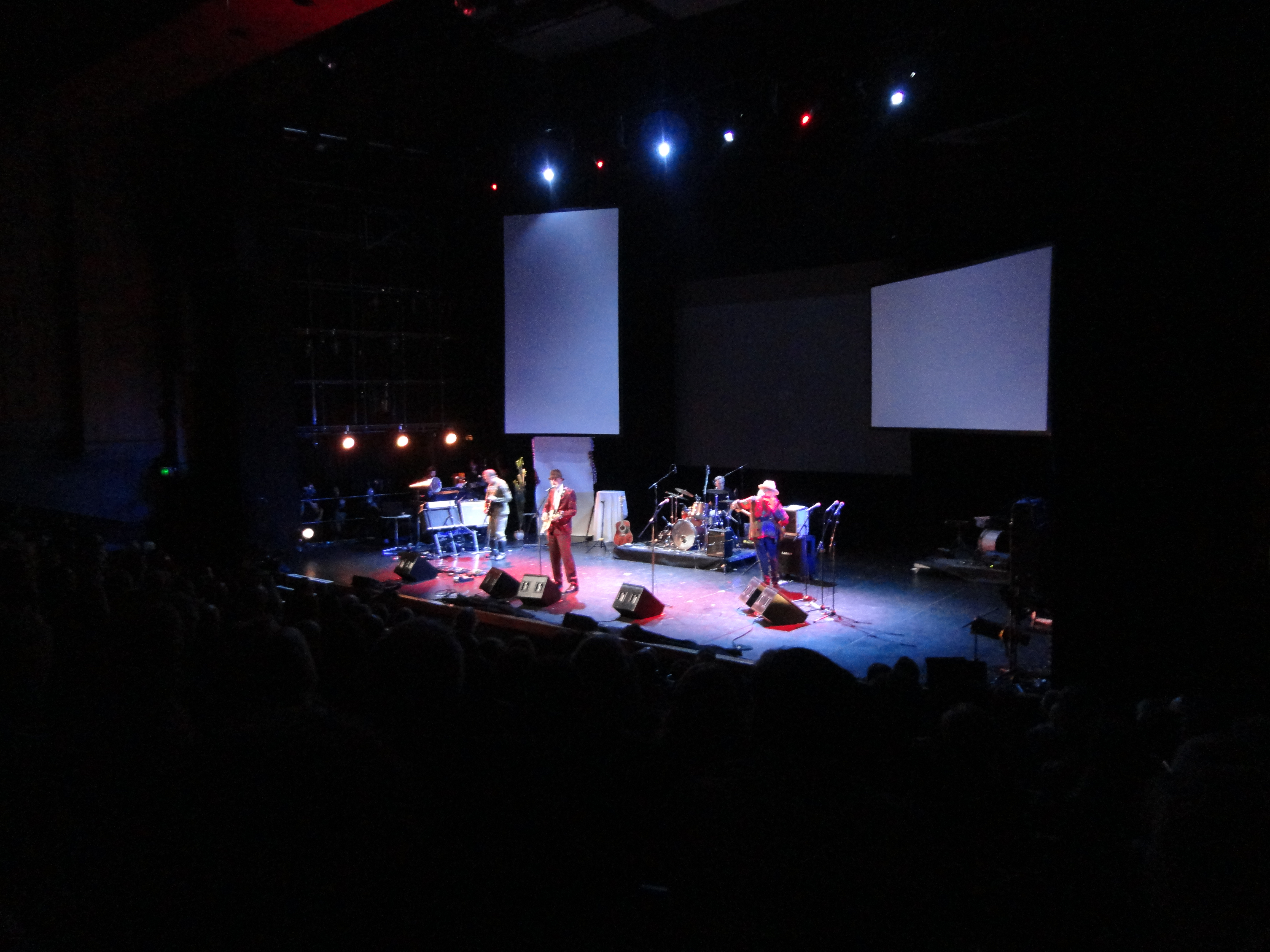 Reunion am 11.10.2014 Queen Elisabeth Hall, London